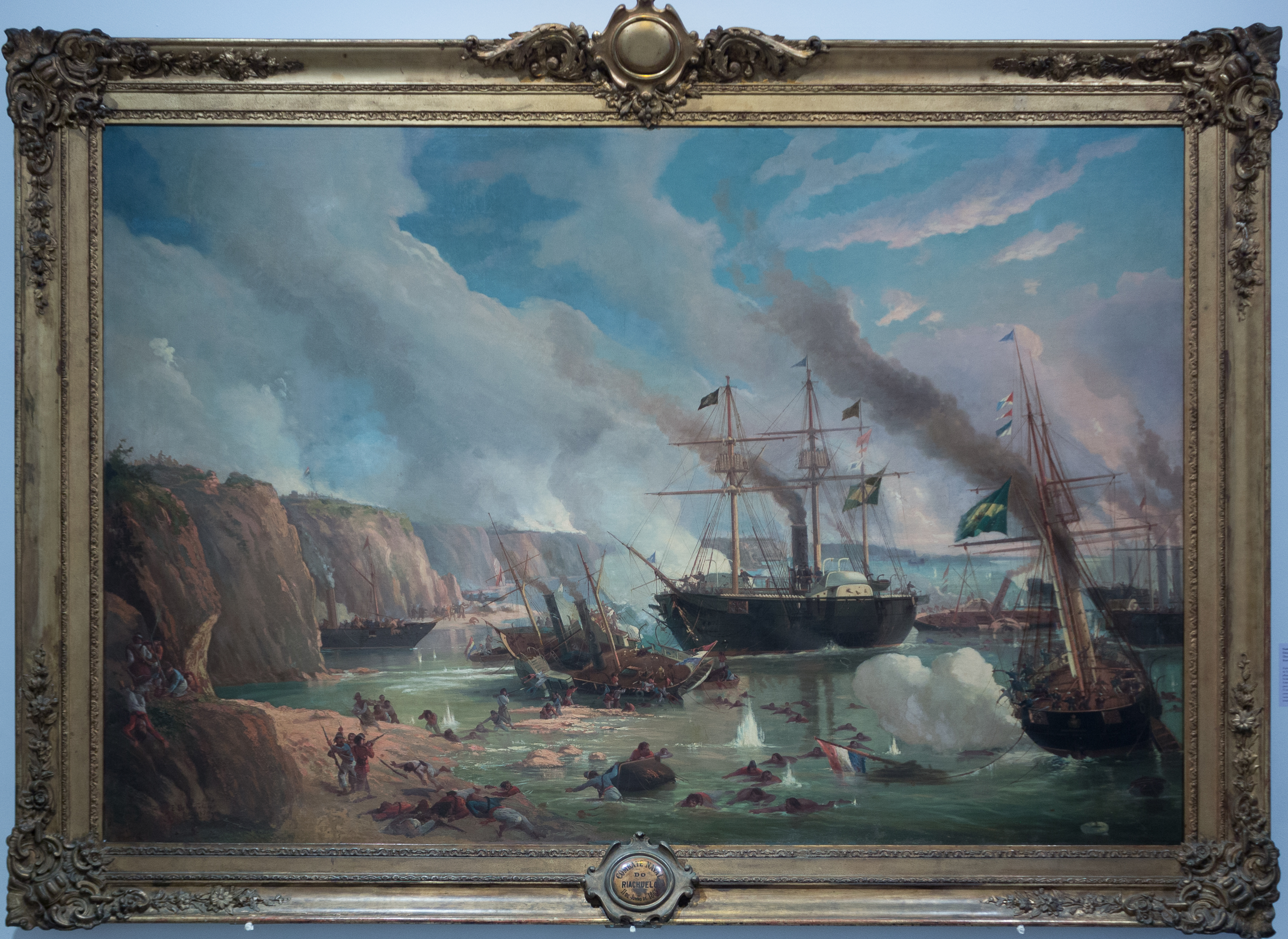 Obra da coleção Brasiliana Iconográfica.